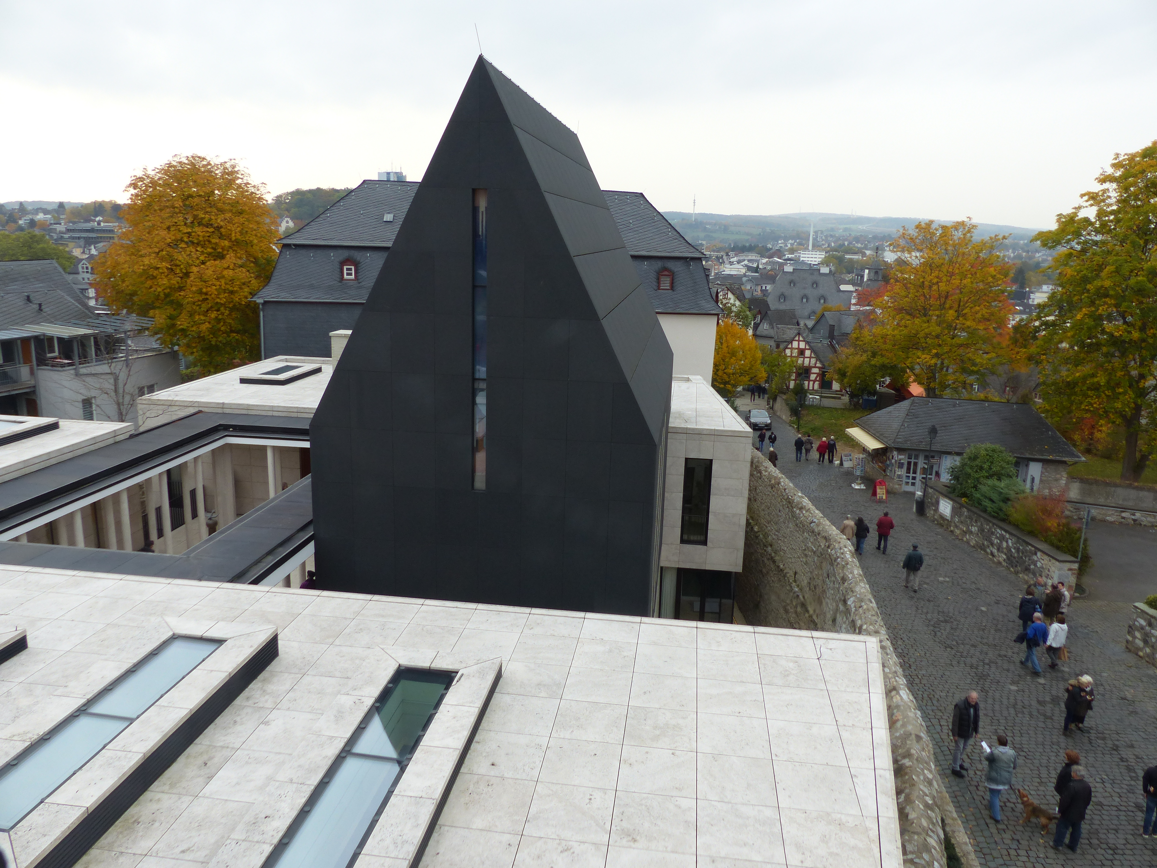 Blick aus der Bibliothek des Limburger Bischofs auf die Privatkapelle St. Maria